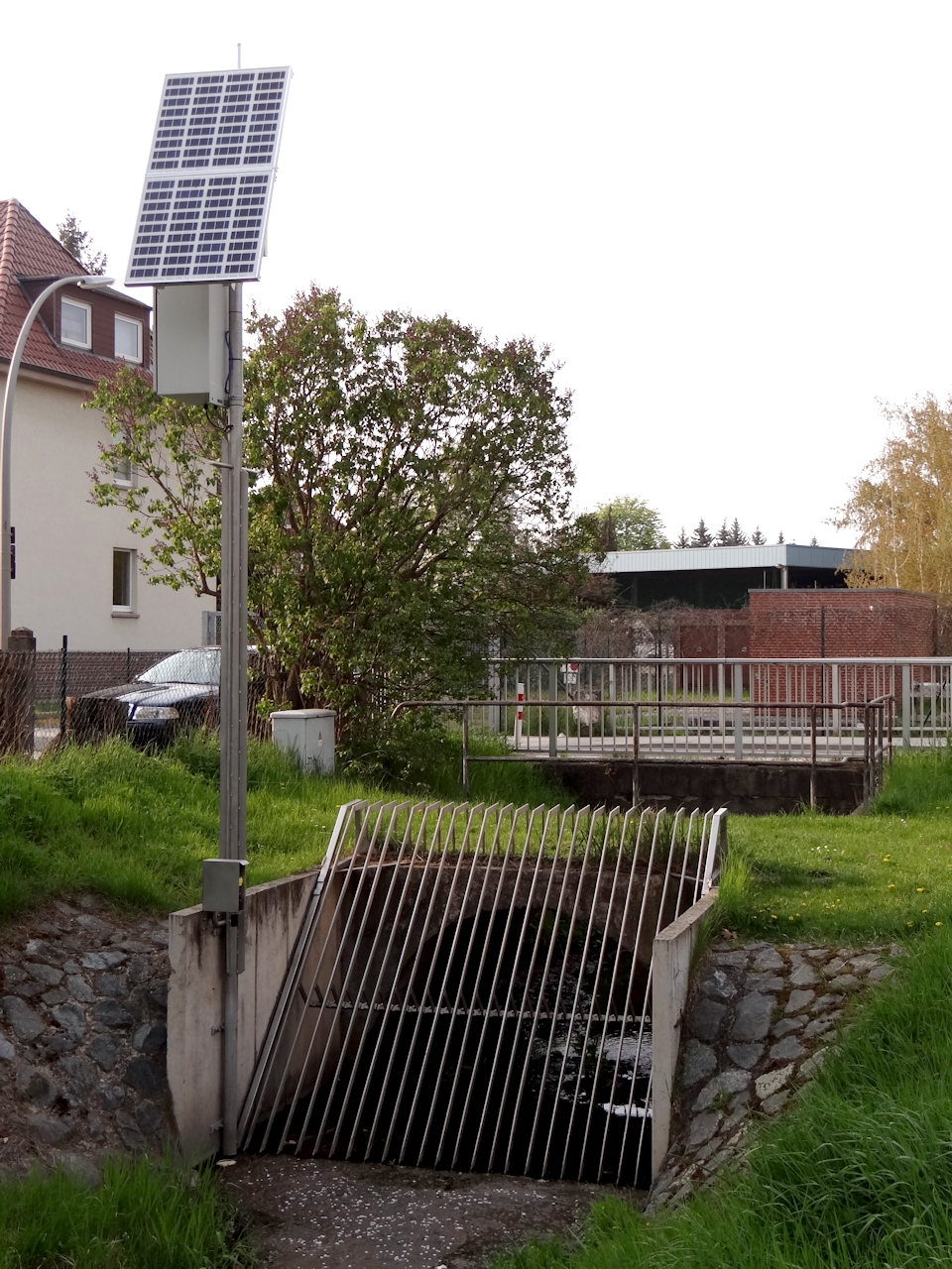 Pumpwerk Triftweg im Verlauf der Schölke, hier das Rechengitter vor der Straßenunterquerung, im Hintergrund das eigentliche Pumpwerksgebäude.